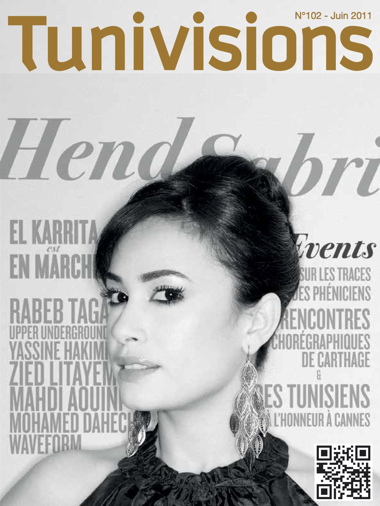 Couverture du numéro 102 du magazine tunisien Tunivisions.